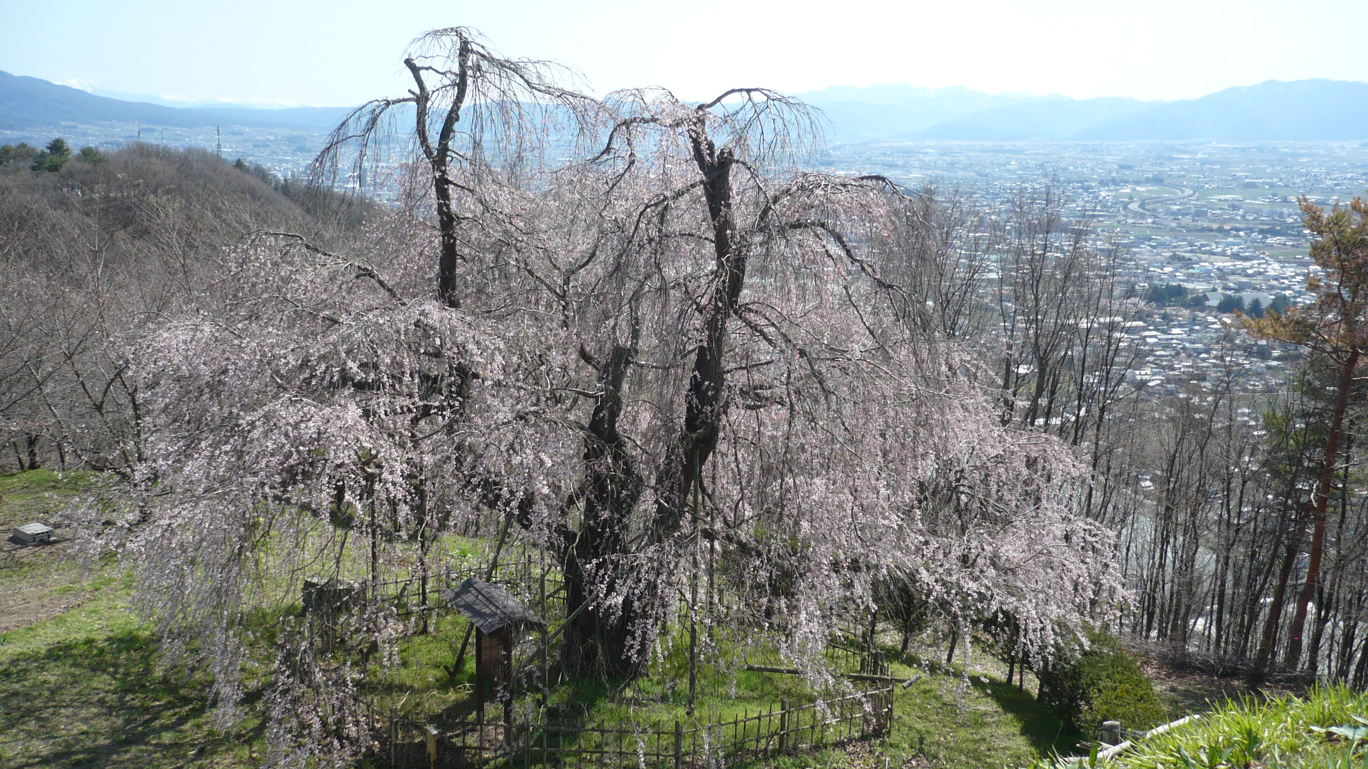 泉小太郎の枝垂桜